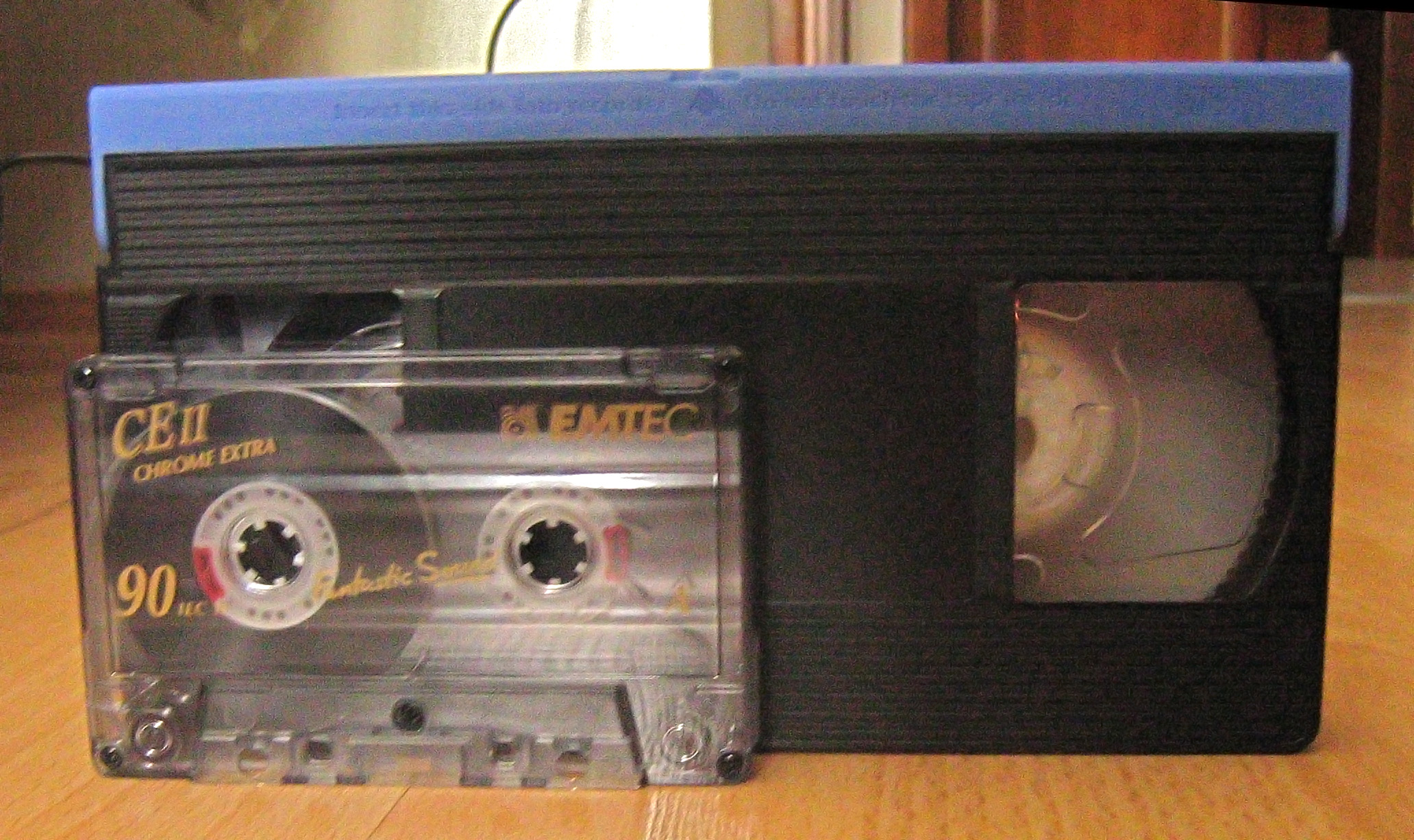 Сравнение размеров аудио и видеокассеты